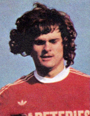 Didier Six (1978), 'Eurofootball 1978 - 1979', Panini figurina n°105.